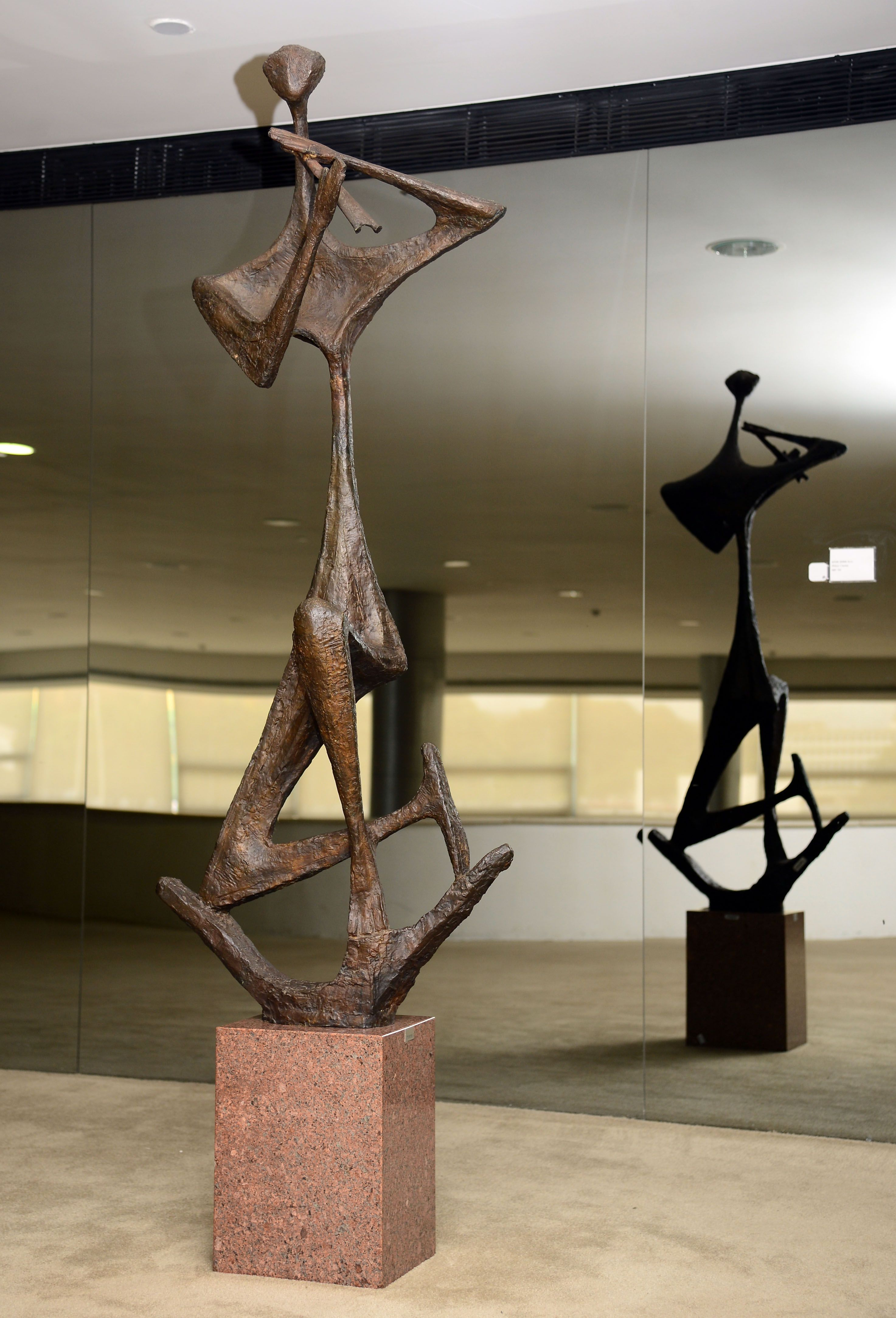 Brasília - Acervo artístico do Palácio do Planalto reúne 146 quadros e 17 esculturas exposta em áreas públicas do prédio. Obra O Flautista, de Bruno Giorgi.